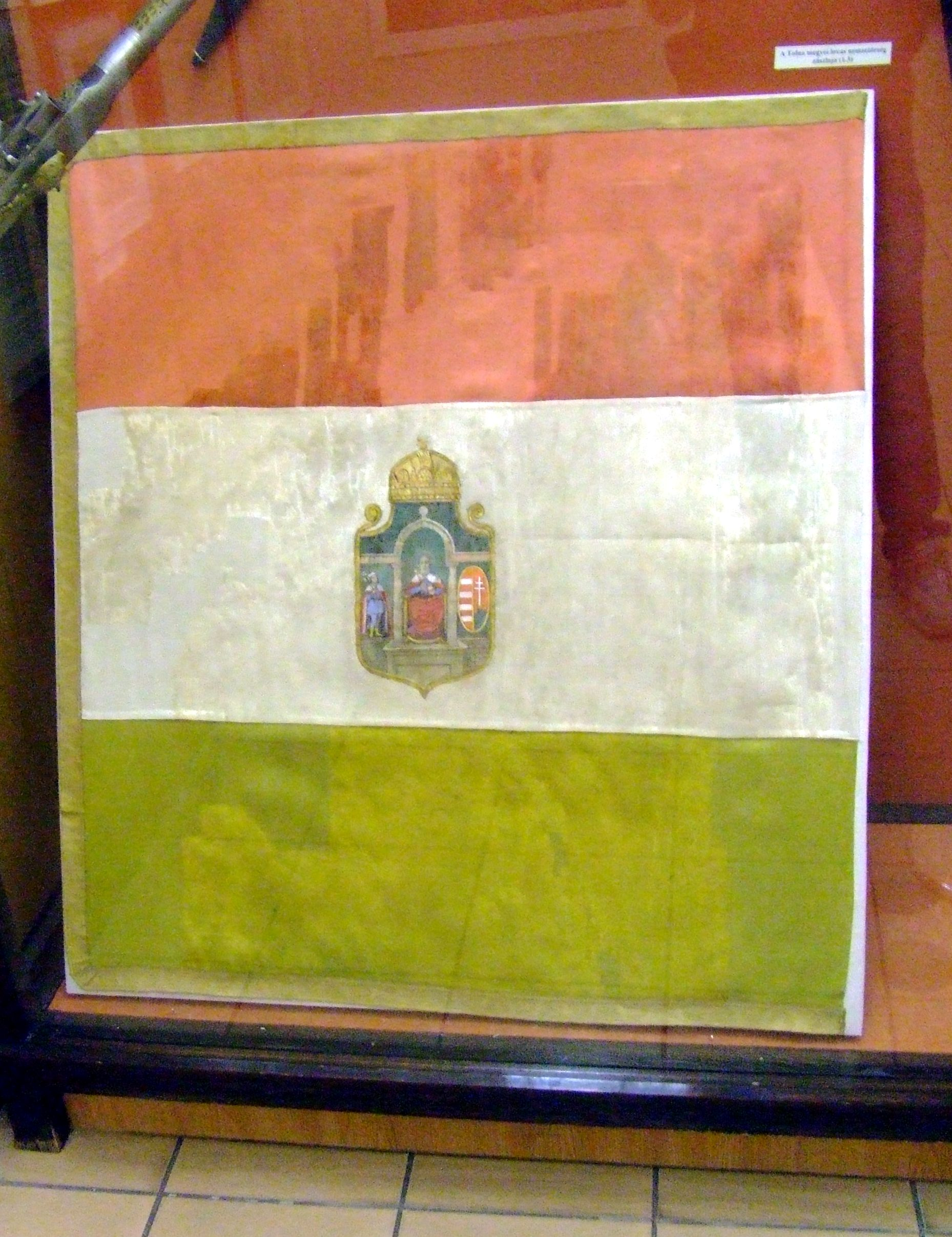 A Tolna vármegyei lovas nemzetőrség zászlaja Military History Institute and Museum LocationBudapestCoordinates47° 30′ 15″ N, 19° 01′ 38″ E Established1922Web page control : Q1032469 VIAF: 156542431 ISNI: 0000 0001 0860 6822 LCCN: n85040347 WorldCat institution QS:P195,Q1032469